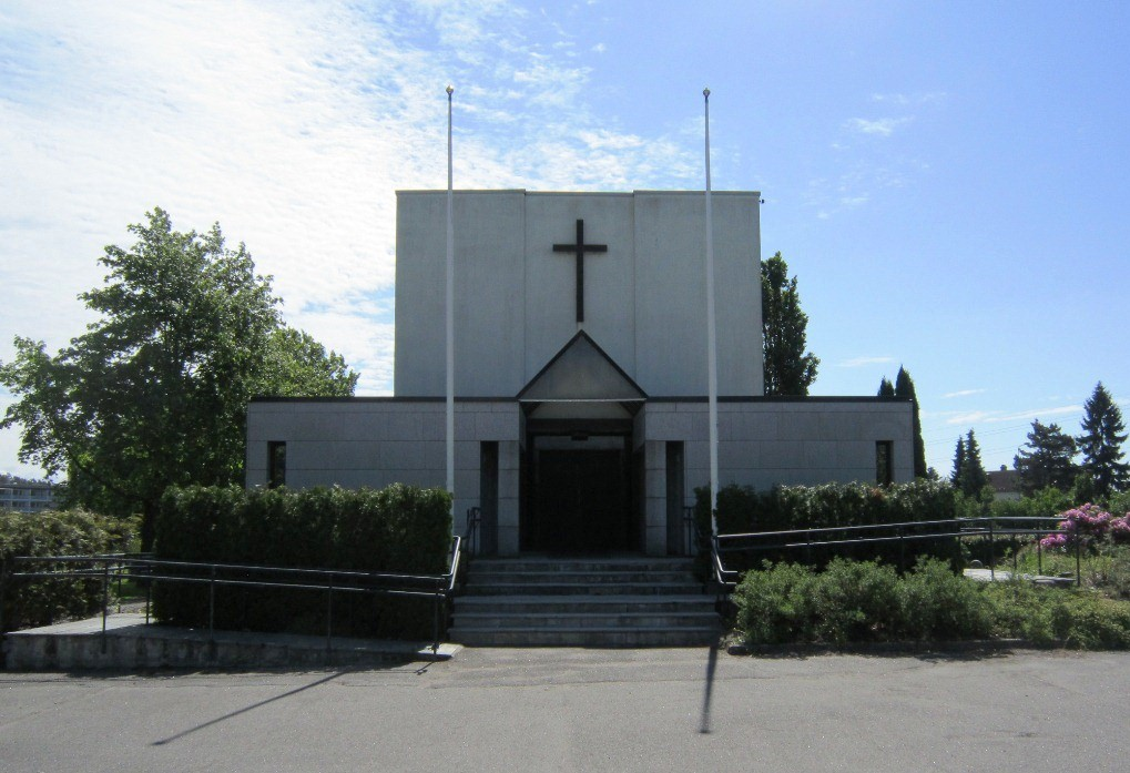 Tønsberg kapell og krematorium. Kapellet er fremdeles i bruk, men krematoriet er nedlagt.